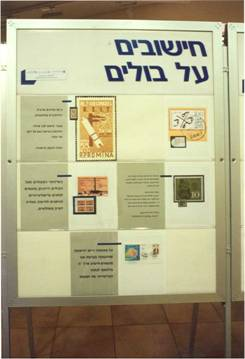 תערוכת בולי מתמטיקה